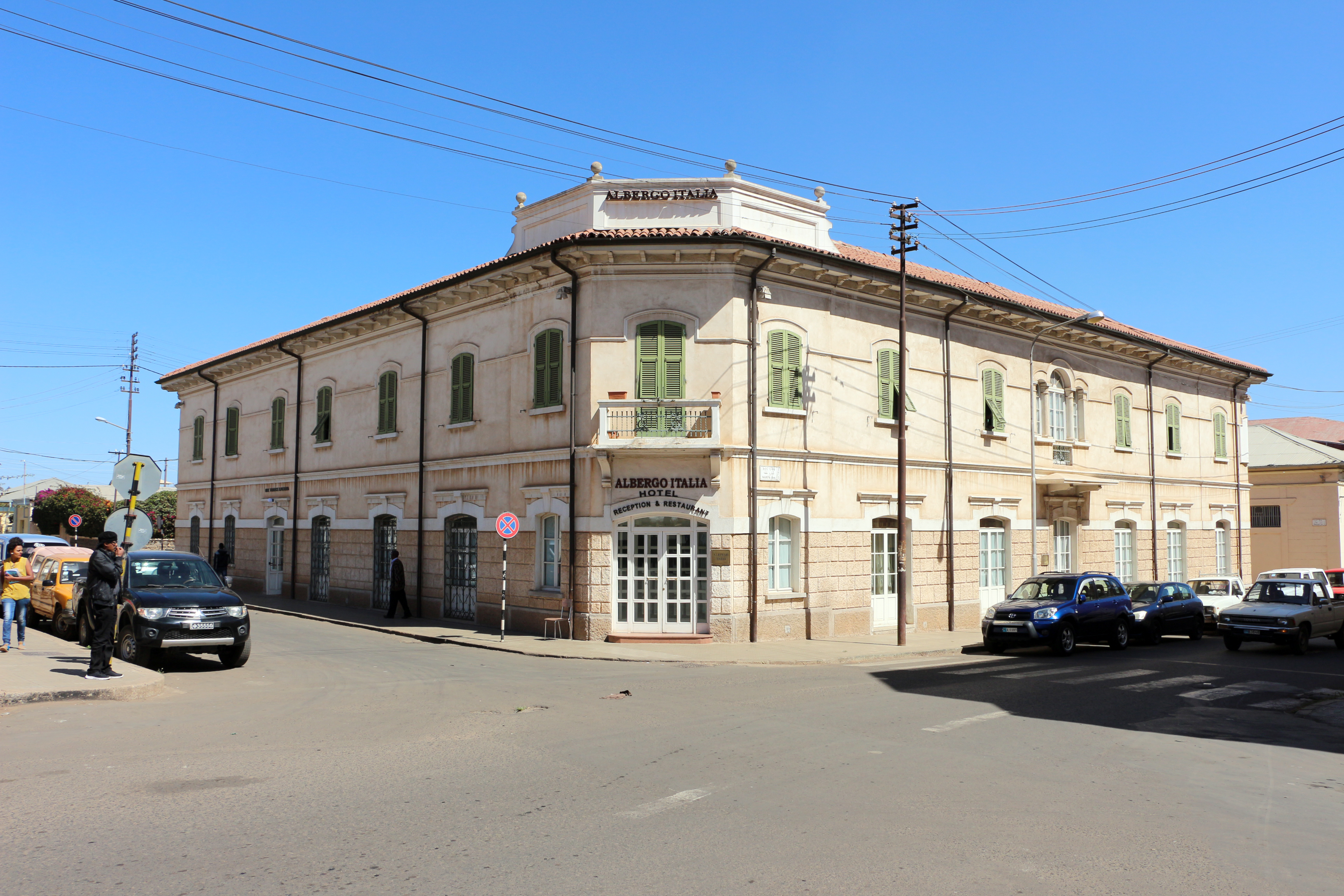 Asmara, albergo italia, esterno 01.JPG